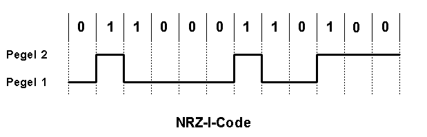 NRZ-I-Kodierung Andere Versionen: NRZ-L-Kodierung, NRZ-S-Kodierung, RZ-Kodierung